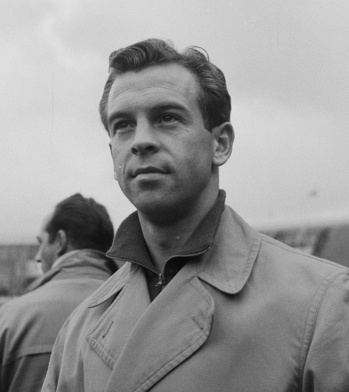 Photographie du footballeur néerlandais Bart Carlier (Fortuna).